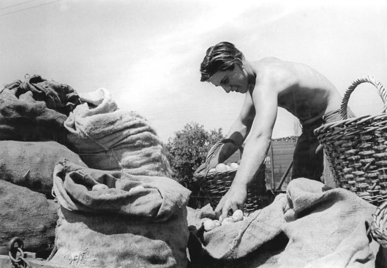 ZB-Biscan-30.6.1959 Ladung und Ablieferung der Frühkartoffeln - Vom werktätigen Einzelbauer Gunter Völcke in Lensdorf bei Magdeburg beeilt sich, die Frühkartoffeln zu roden und zur Ablieferung zu bringen, er könnte damit in den Genuss der hohen Erfassungspreise und Abrechnungssätze, die die Regierung der DDR für die frühzetige Ablieferung der Frühkartoffeln festgesetzt hat. Bei Ablieferung bis zum 30.6.1959 werden für hundert Kilogramm Frühkartoffeln 150 Kilogramm auf das Soll angerechnet, der Erfassungspreis beträgt bis 30. Juni 270, -- DM je Tonne. UBz: Karl Völcke jun. beim Absacken der Frühkartoffeln.Lemsdorf, Einsacken der Kartoffelernte